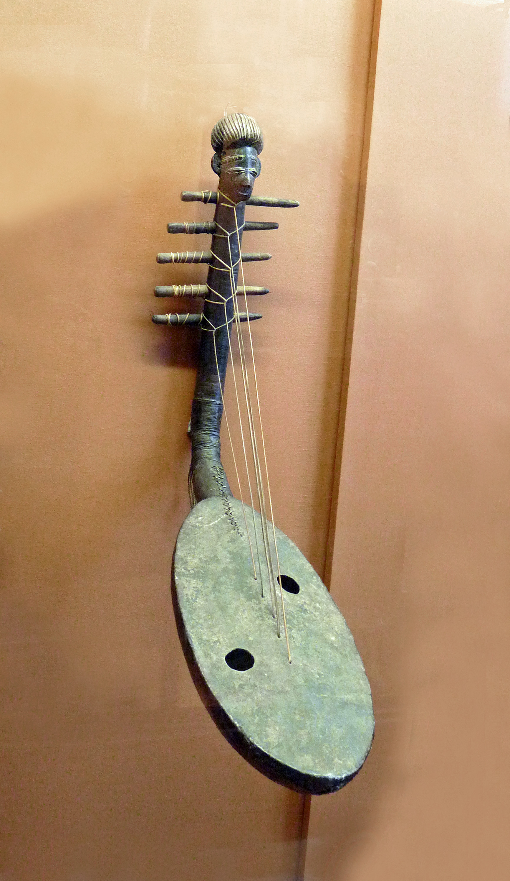 Zande-Harpe anthropomorphe-Musée royal de l'Afrique centrale